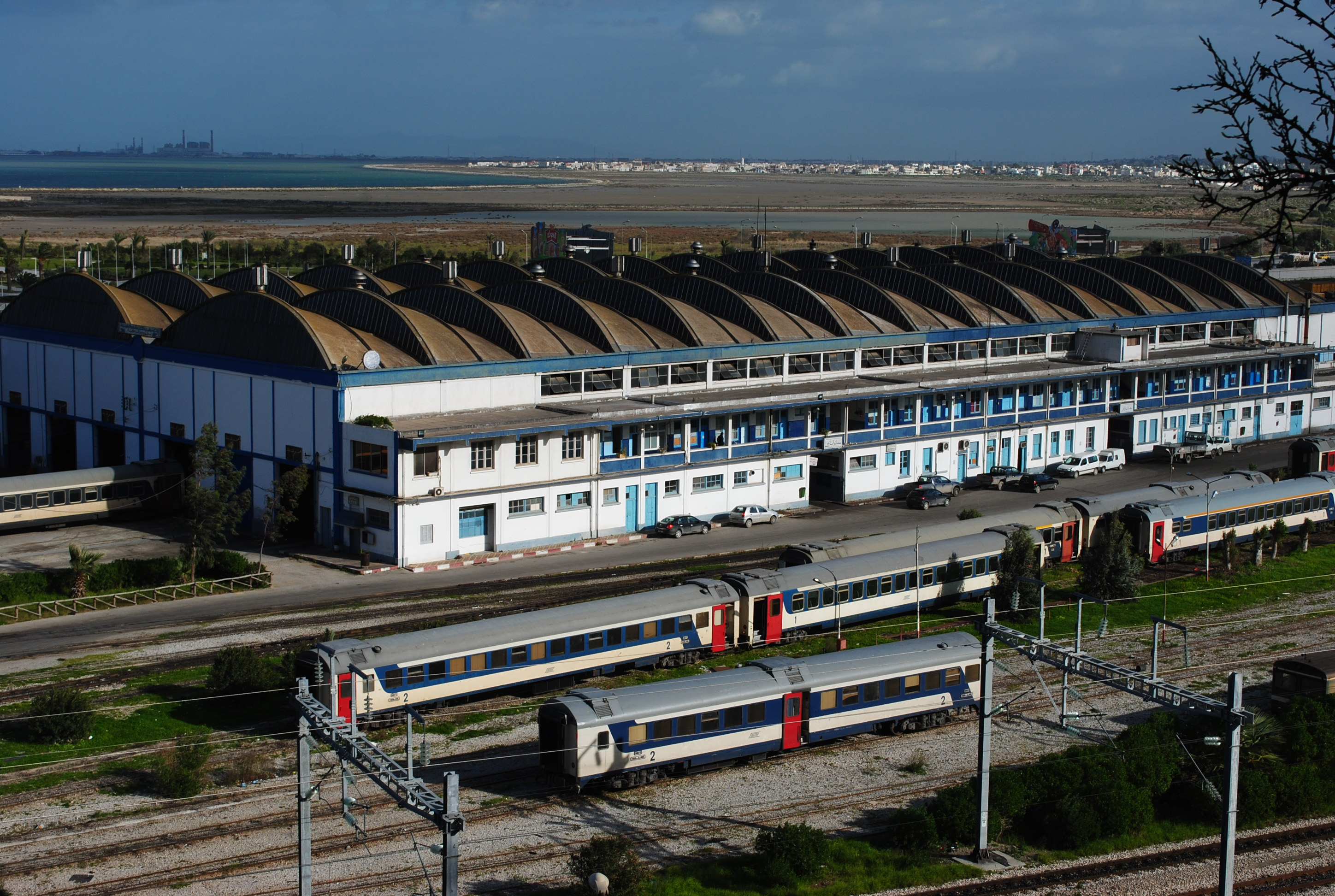 Dépôt de manutention de la SNCFT de Djebel Jelloud